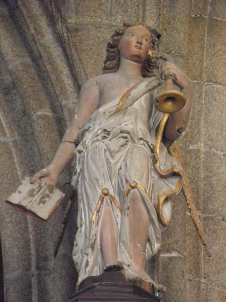 Ange musicien. Statue couronnant l'abat-voix de la chaire de l'église Saint-Sulpice de Fougères (35).